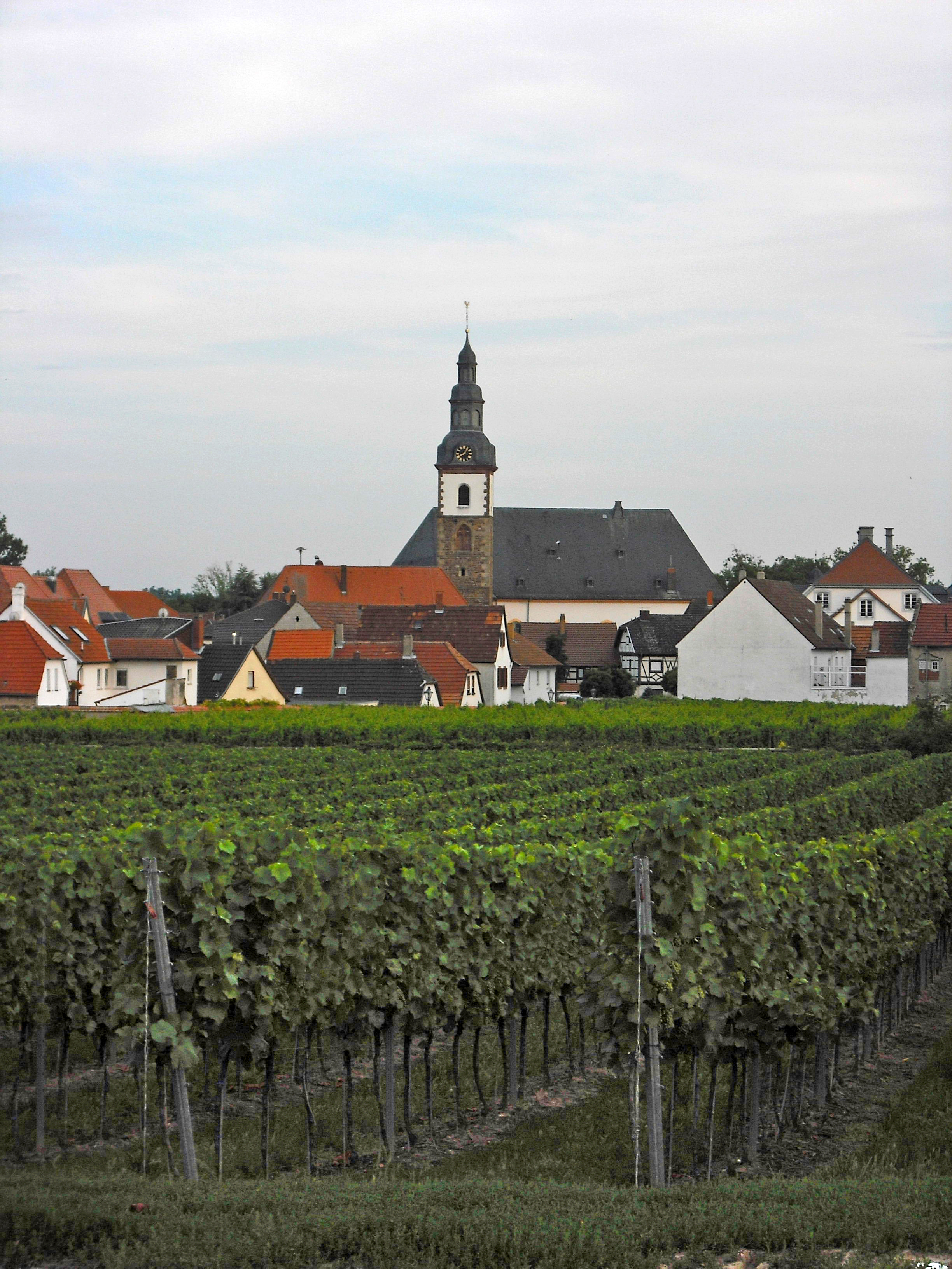 Weinlage Dirmsteiner Jesuitenhofgarten vor der Kulisse des Dirmsteiner Oberdorfes